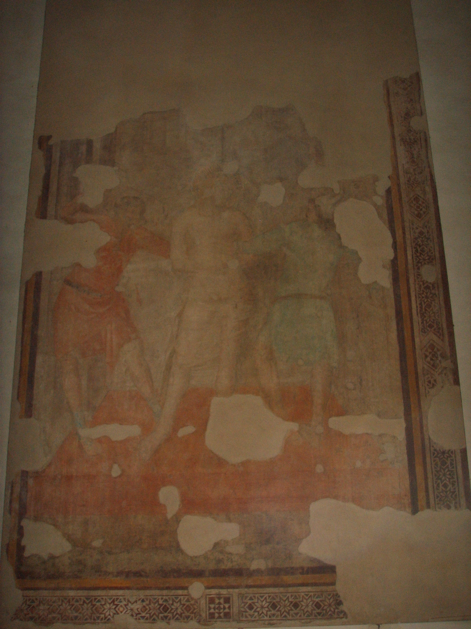 Badia Fiorentina church nardo_di_cione_(attribuzione),_cappella_di_san_bernardo in Florence, italy